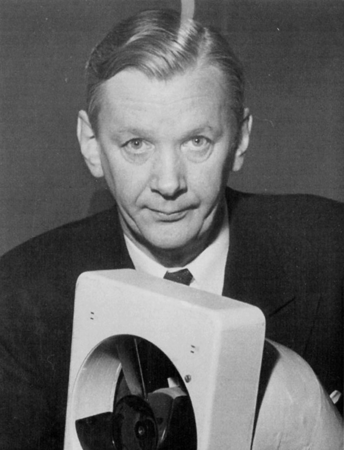 Carl Georg Munters